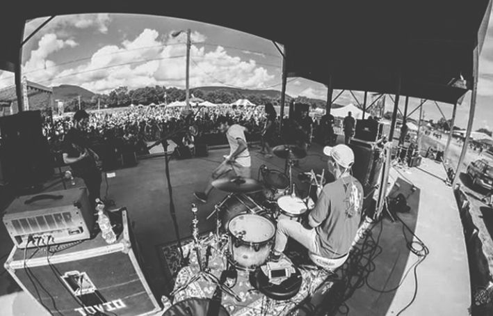 Belmont live show